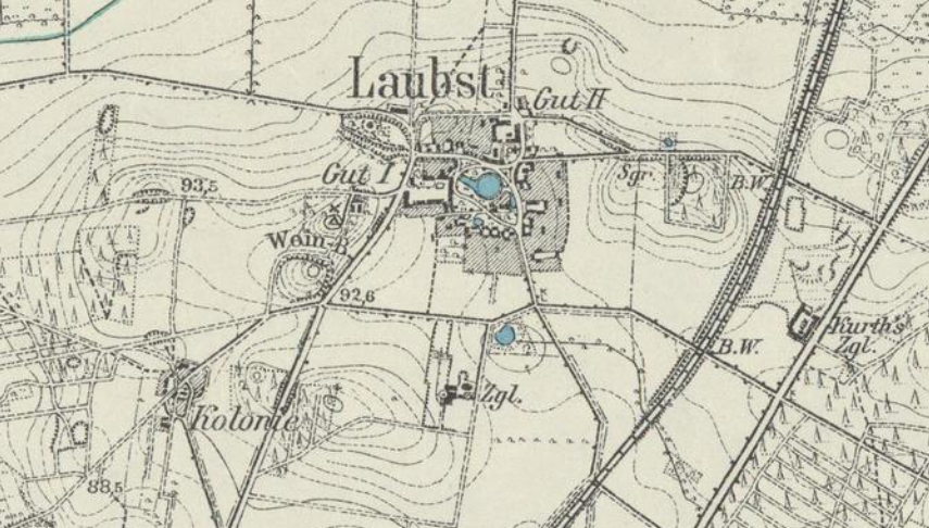 Laubst, Ortsteil der Stadt Drebkau, Lkr. Spree-Neiße, Brandenburg, Ausschnitt aus dem Messtischblatt 4351 Drebkau von 1919